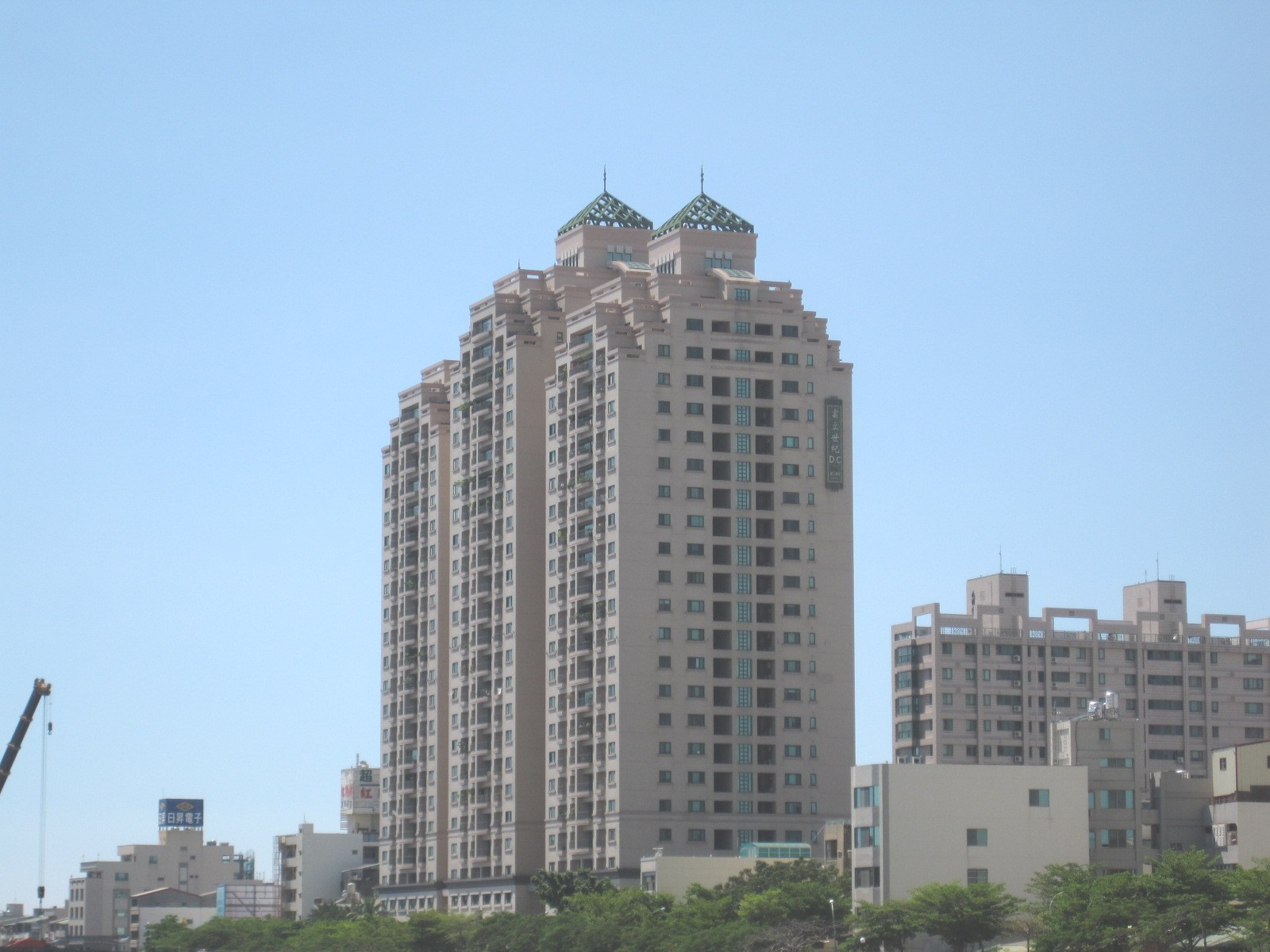 中文（台灣）: 富立世紀D.C，位在臺南運河旁的大樓